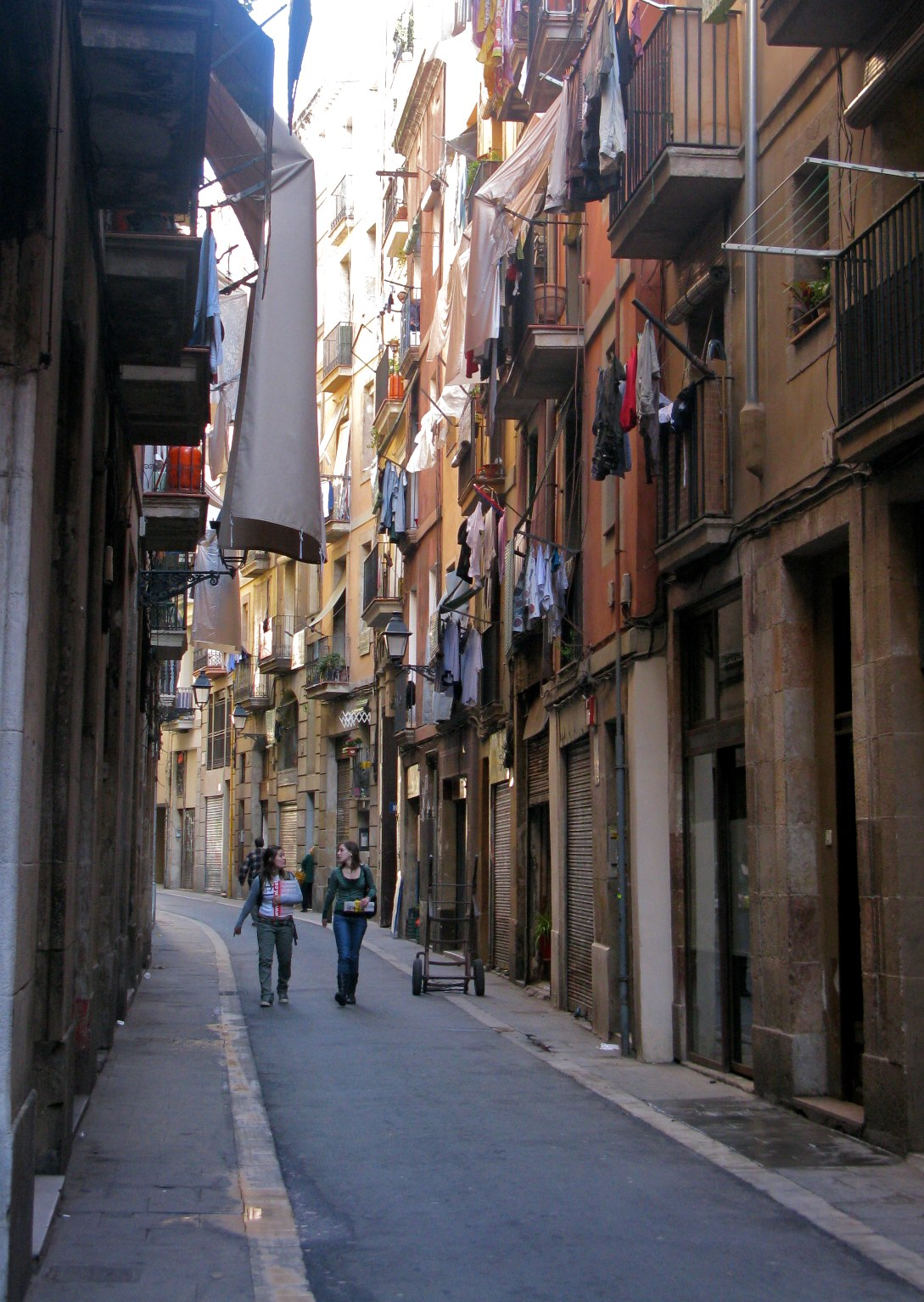 Barcelona El Raval 37